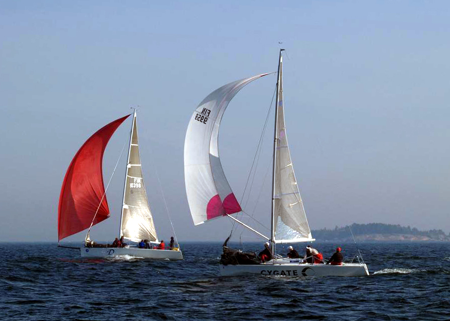 purjehduskilpailu, Suomen Urheiluveneliitton luokkamestaruus 2006, Helsinki